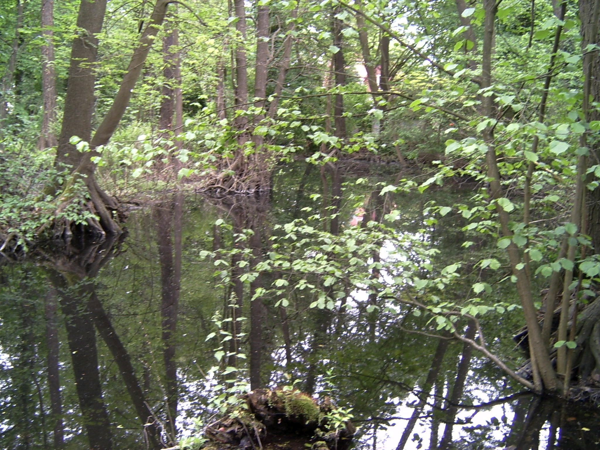 Fredersdorfer Mühlenfließ in Schöneiche, "Kleiner Spreewald"